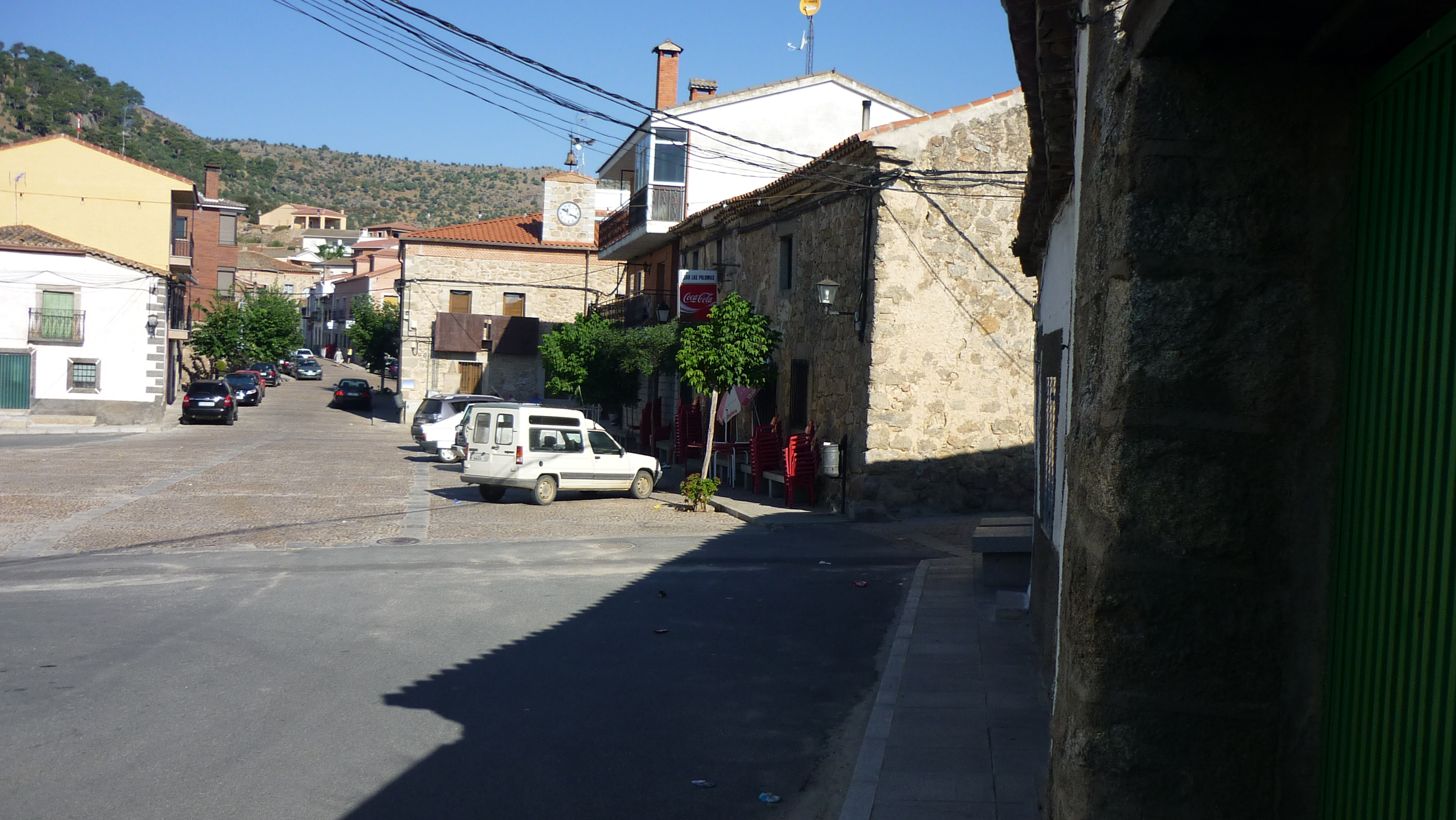 Localidad abulense (España) de Santa Cruz de Pinares. Vista de la plaza del pueblo, el ayuntamiento y la calle Mayor. Al fondo, la sierra.